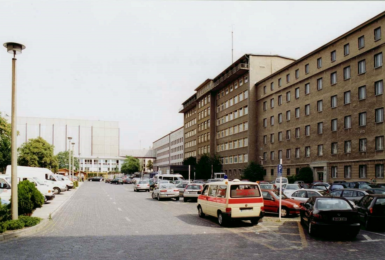 Ministerium für Staatssicherheit, Berlin-Lichtenberg, Blick rechts auf Haus 1 (Sitz des Büros des Ministers), im Hintergrund Mitarbeiterkantine und Kaufhalle